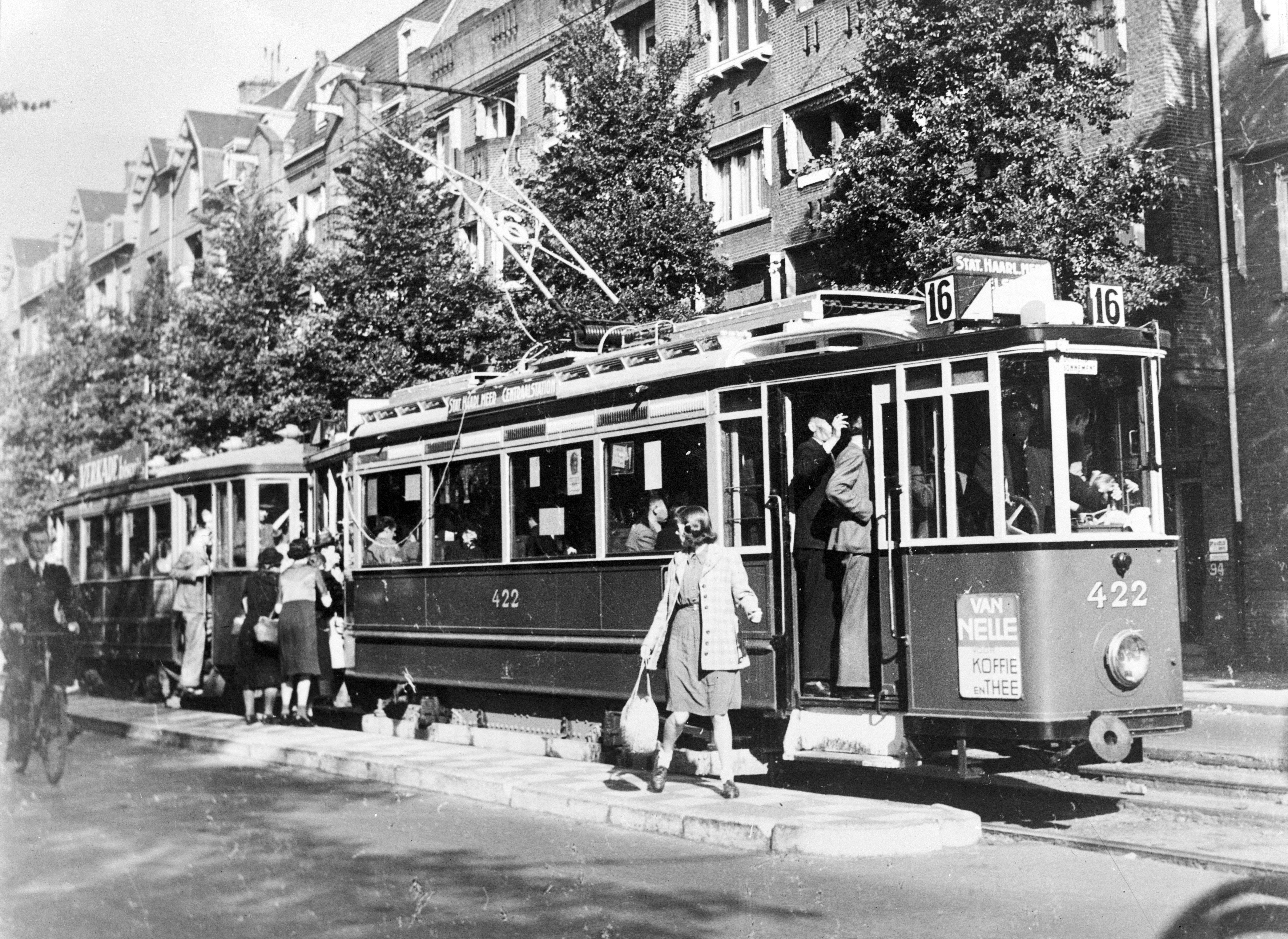 Collectie / Archief : Fotocollectie Anefo Reportage / Serie : [ onbekend ] Beschrijving : Tram [lijn 16] met passagiers Datum : 1945 Locatie : Amsterdam Trefwoorden : passagiers, trams, verkeer, vervoer Fotograaf : Fotograaf Onbekend / Anefo Auteursrechthebbende : Nationaal Archief Materiaalsoort : Negatief (zwart/wit) Nummer archiefinventaris : bekijk toegang 2.24.01.04 Bestanddeelnummer : 900-0335 Reacties Geplaatst door timcastricum op 30 juli 2013 - 22:10. Ik meen de De Lairessestraat in Amsterdam te herkennen.